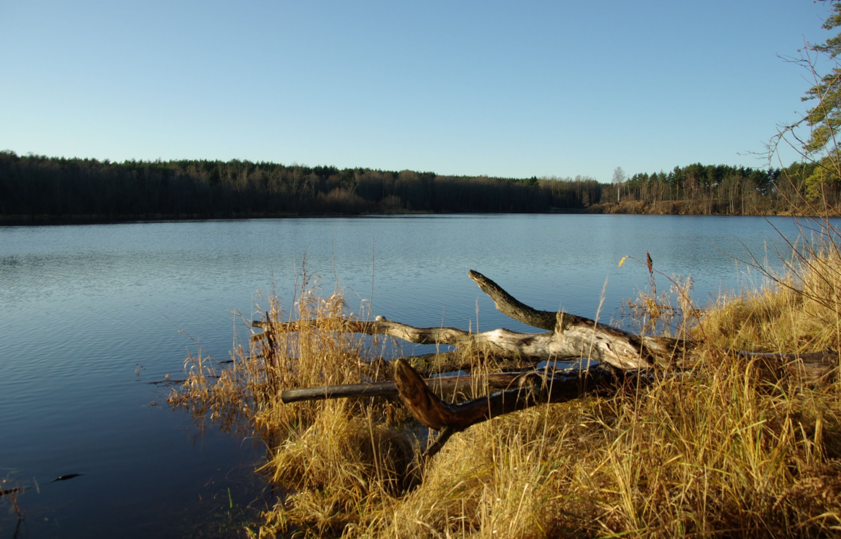 Linnamäe paisjärv Jägala jõel